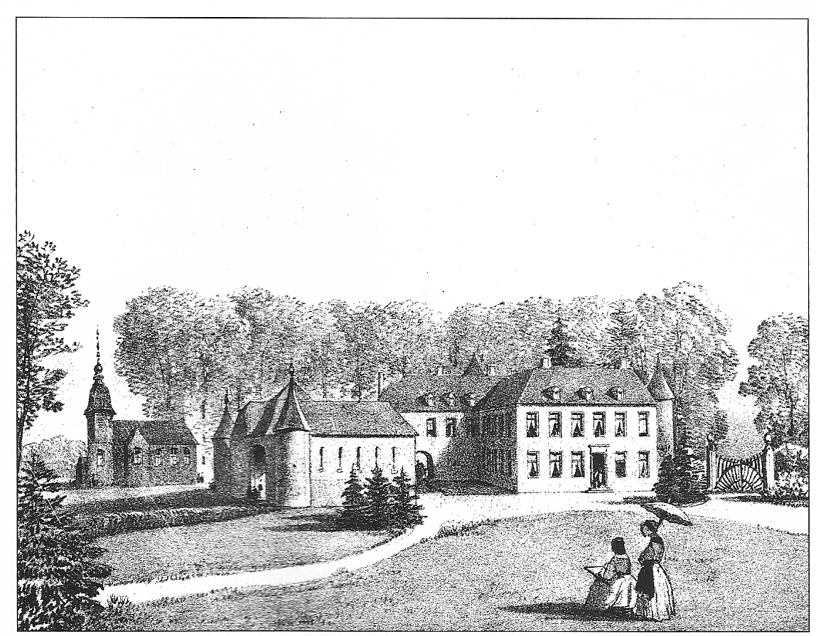 Château de Mianoye deuxième état